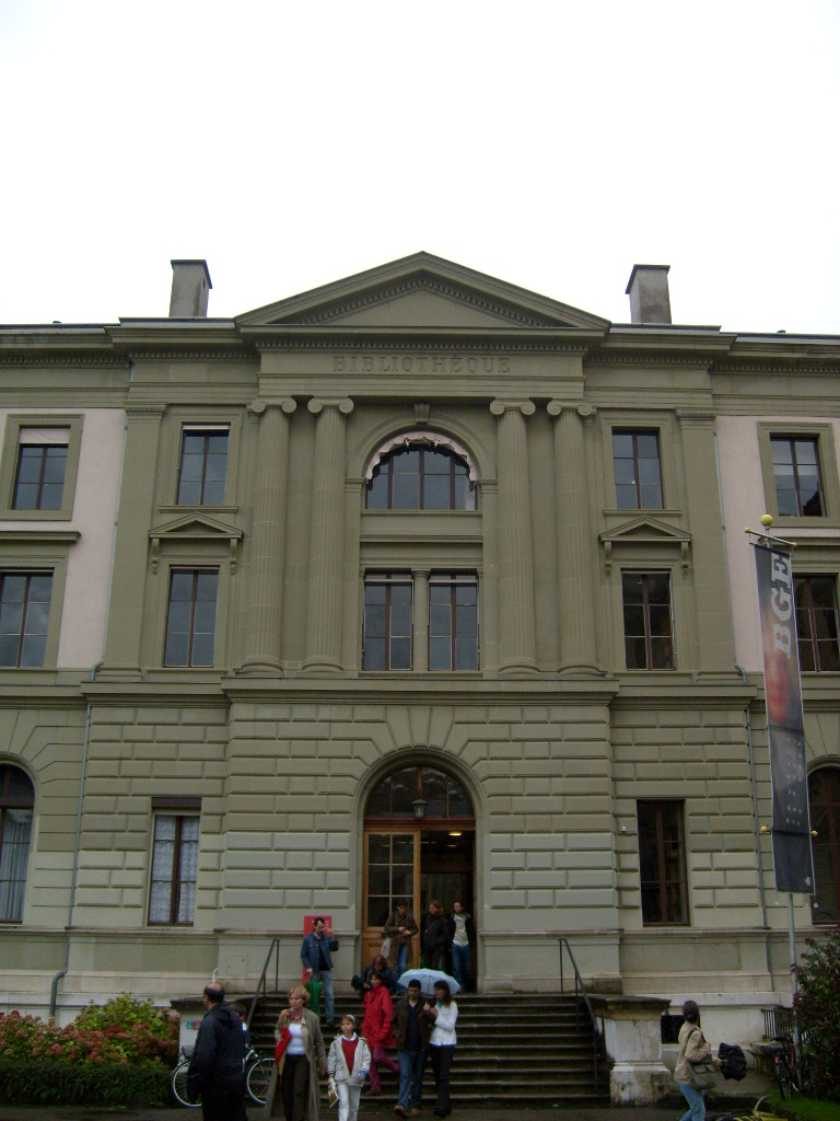 Façade de la Bibliothèque de Genève (Suisse)